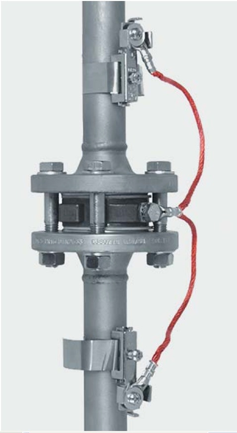 Отвод статического эл-ва